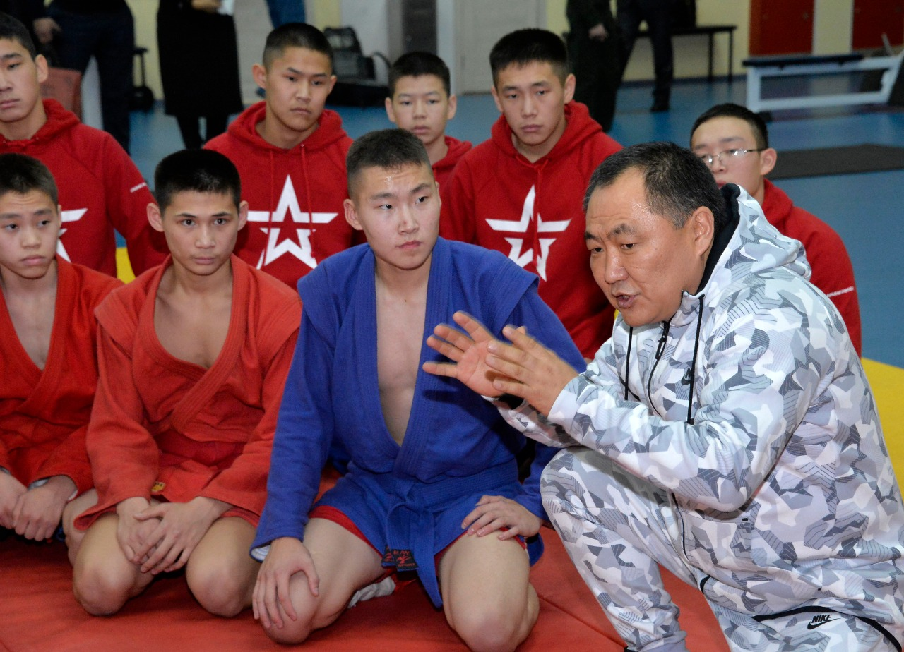 Шолбан Кара-оол с воспитанниками ЦСКА